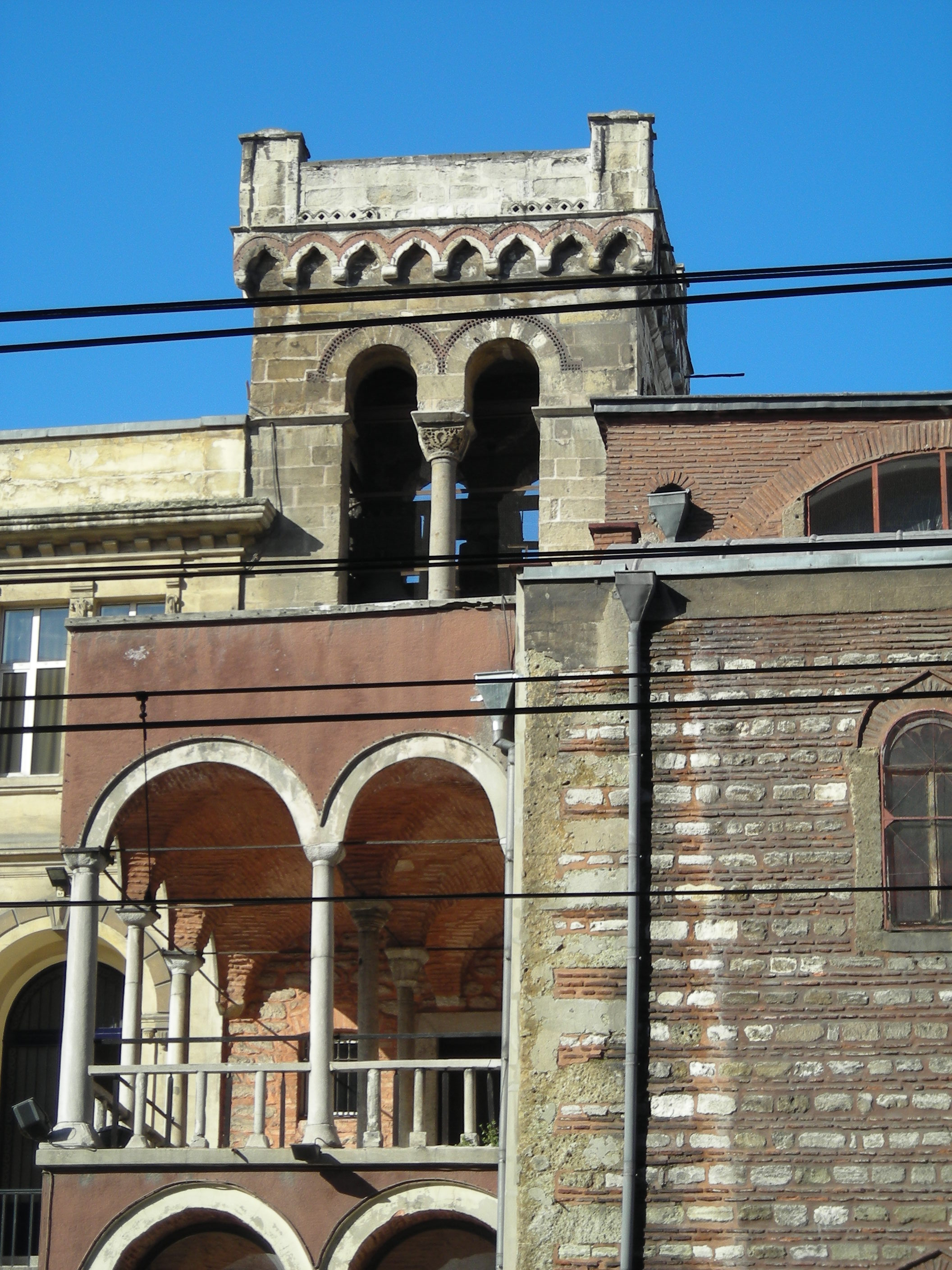 Clocher de l'église St. Benoît à Istanbul